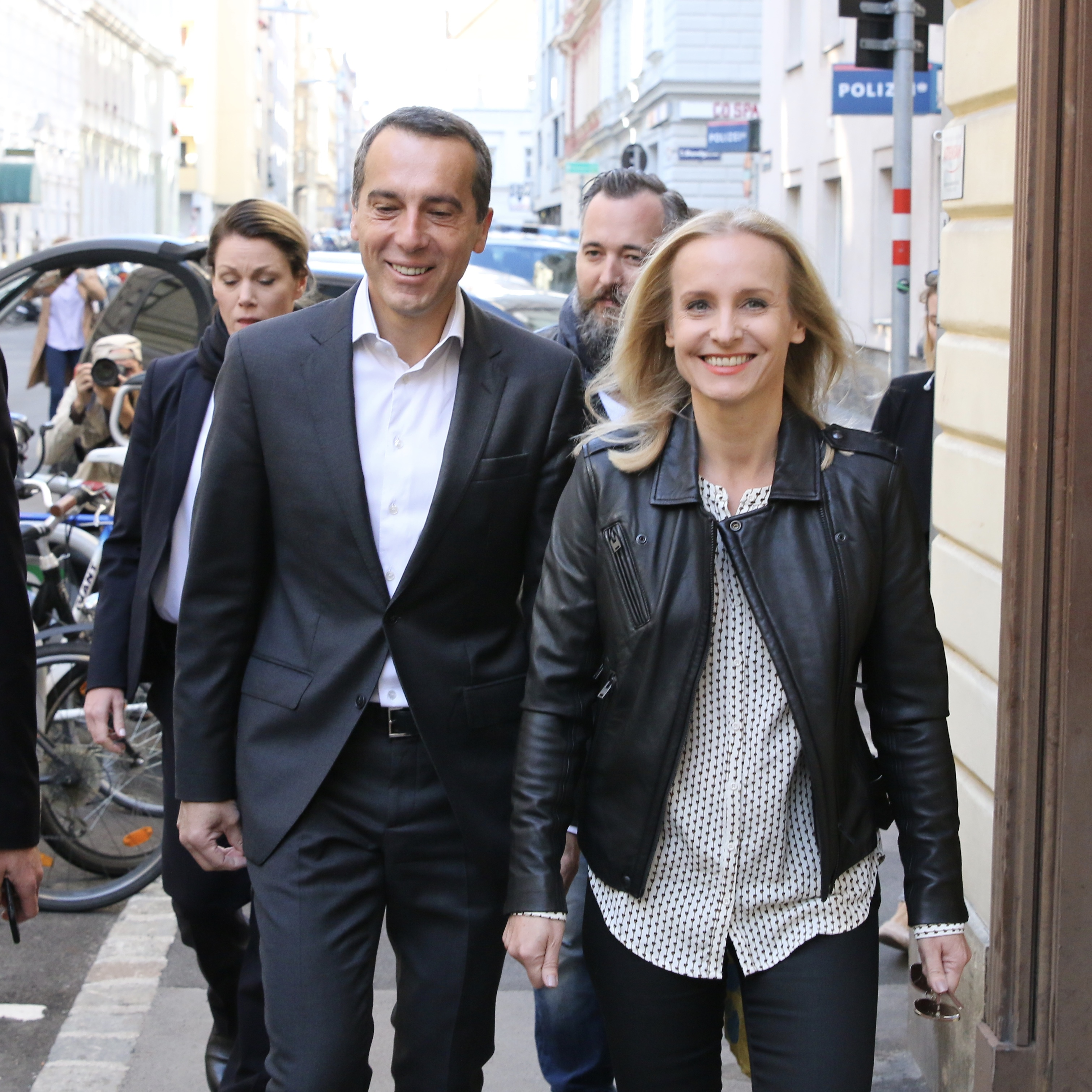 7585940192_IMG_8053